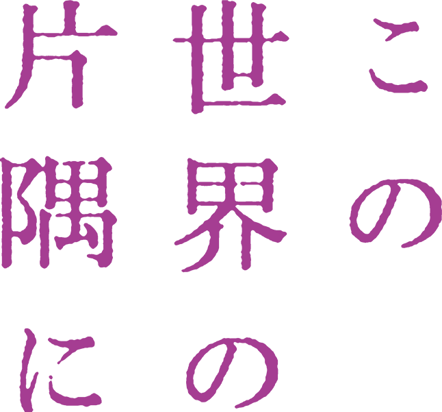 この世界の片隅に